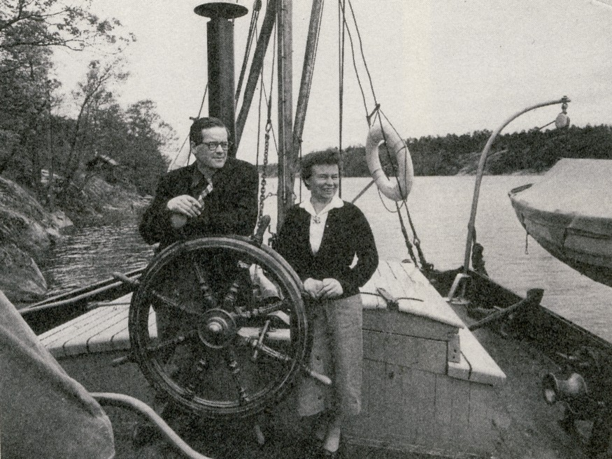 Arkitekt Ralph Erskine och hustru Ruth på "Verona"